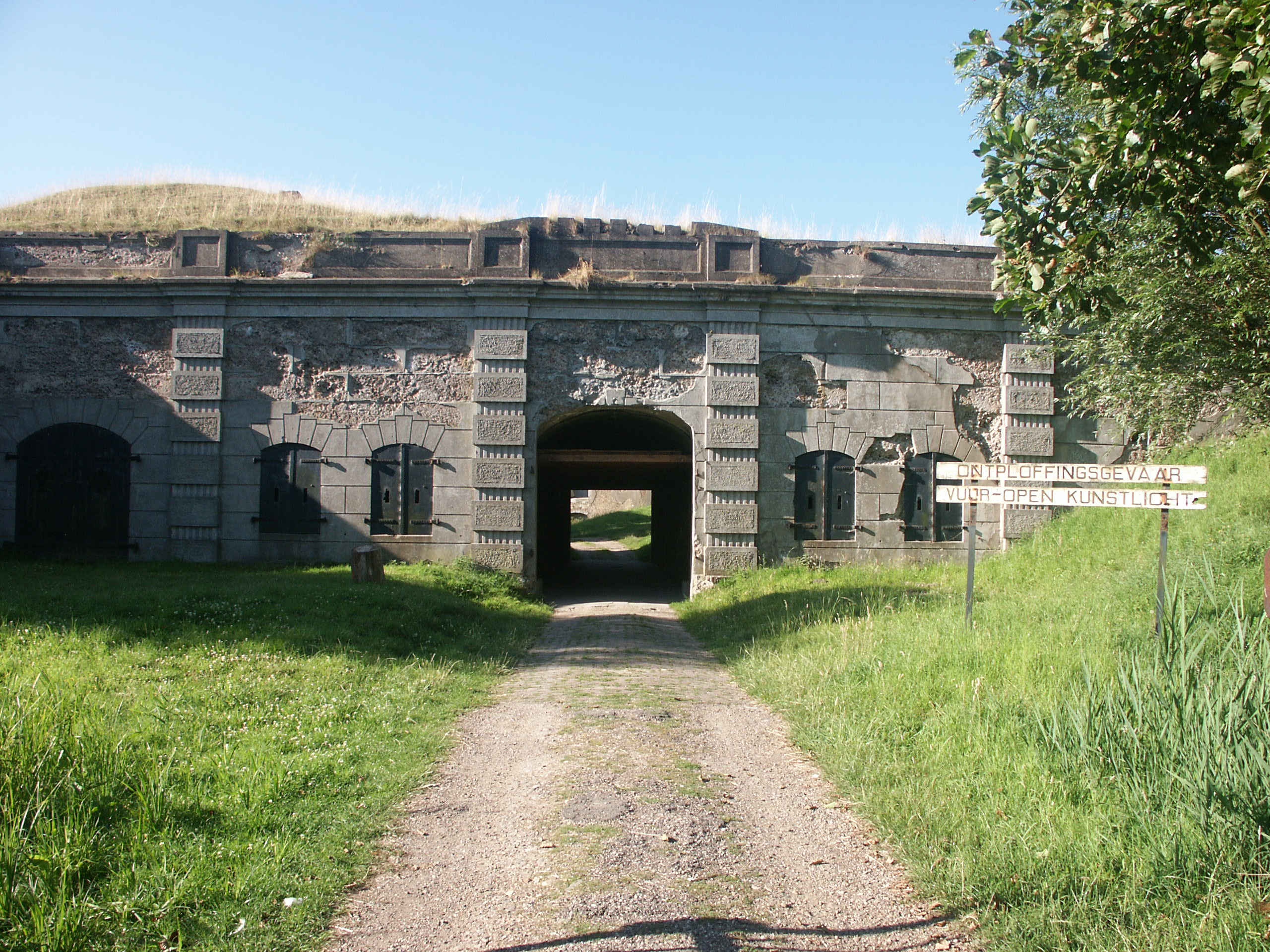 voorgegevel poortgebouw